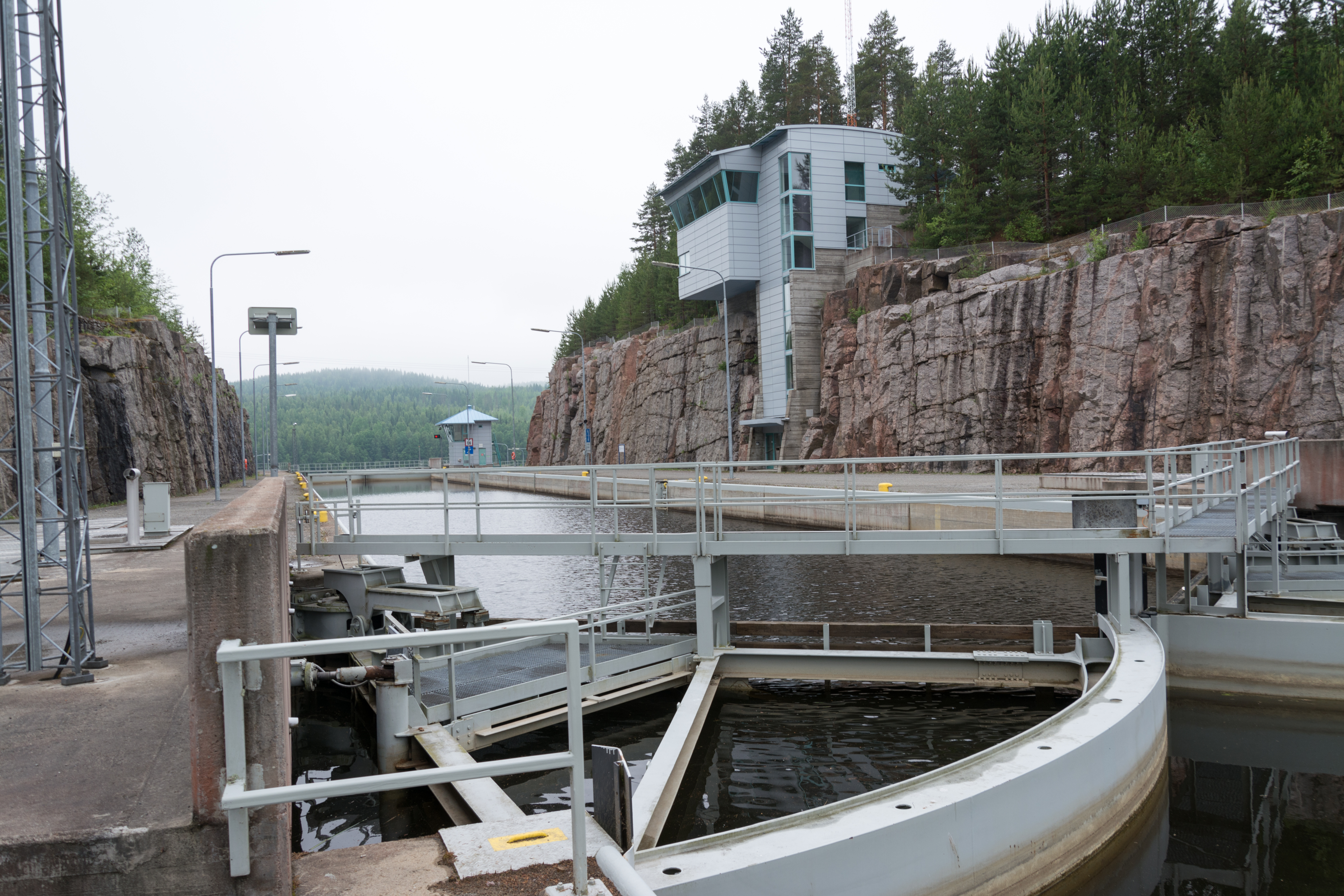 Keiteleen kanavan Paatelan sulku